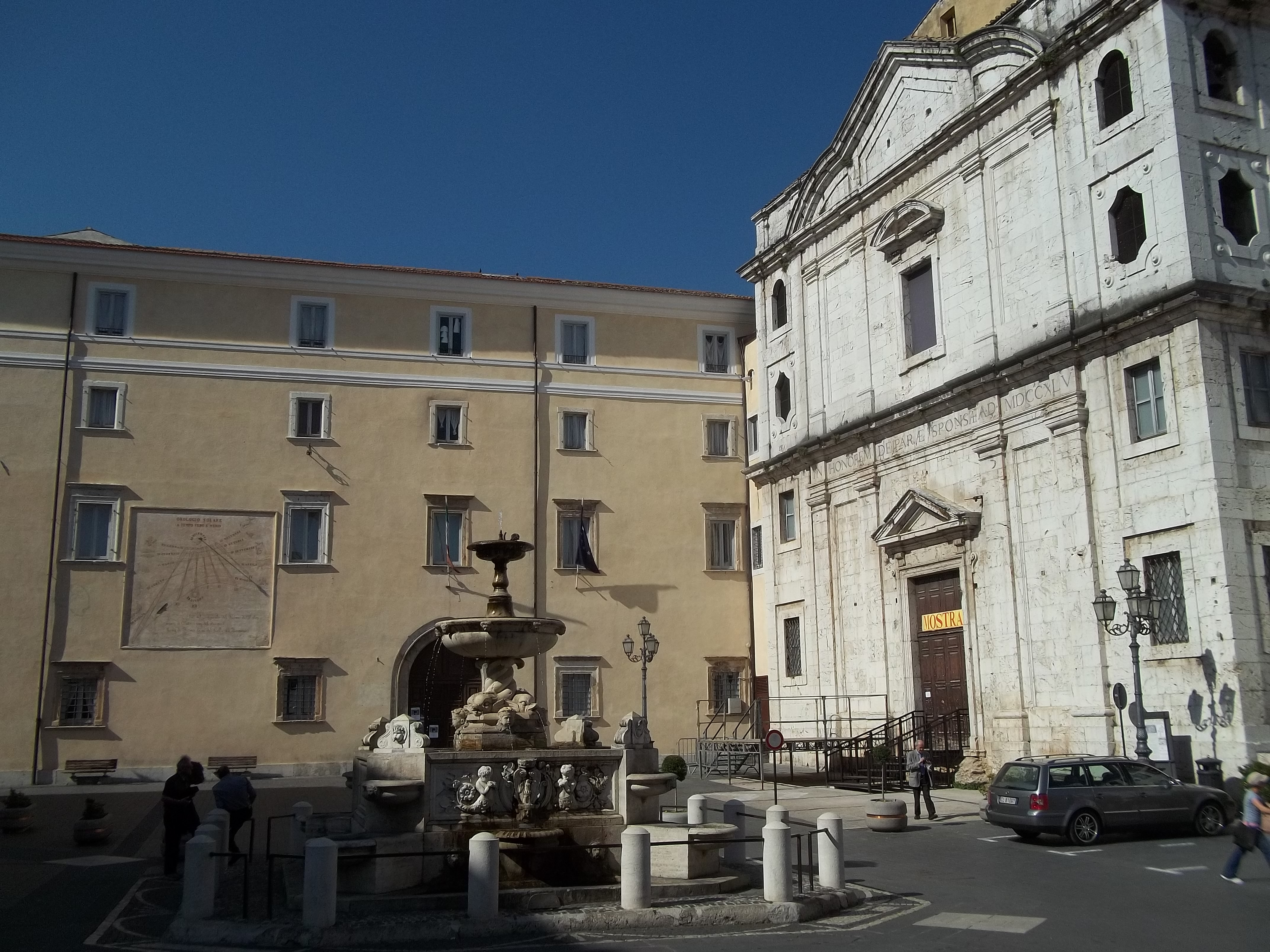 Alatri - piazza Santa Maria Maggiore